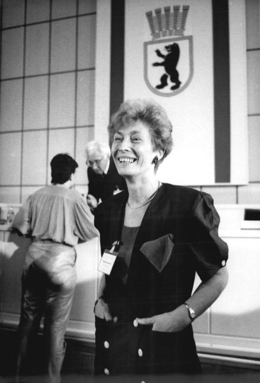 Title: Dr. Christine Bergmann People in the image: Bergmann, Christine Dr.: 1990 Vorsteherin Stadtverordnetenversammlung Berlin, SPD, DDR Factual corrections and alternative descriptions are encouraged separately from the original description. Additionally errors can be reported at this page to inform the Bundesarchiv. Original historic description: ADN-Senft-28.5.90 Berlin: Neue Vorsteherin der Berliner Stadtverordnetenversammlung im Roten Rathaus ist die 50jährige Apothekerin Dr. Christine Bergmann (SPD). Für die einzige Kandidatin stimmten in geheimer Wahl 95 der 134 Abgeordneten, 15 enthielten sich der Stimme.